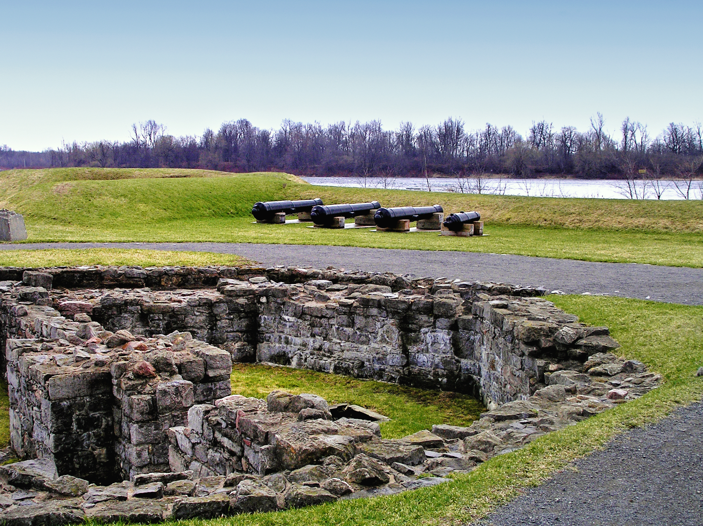 Coteau-du-Lac (Québec) - Vestiges du Fort